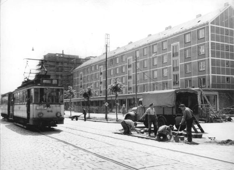 Dresden, Ernst-Thälmann-Straße, Straßenbahn Zentralbild Löwe 21.6.1958 Dresden - Spiegelbild des sozialistischen Aufbaus. Aus den unübersehbaren Trümmerbergen der Elbestadt sind seit 1950 rund 12.000 neu Wohnungen gebaut worden. Planmässig begann der Wiederaufbau Dresdens 1949 im Stadtteil Gruna mit modernen Gebäudekomplexen und vielen neuen Geschäften. Schneller und billiger zu bauen wurde 1956 mit dem industrialisierten Bauen durch die Anwendung der Großblockbauweise verwirklicht. Bisher konnten 1 250 Wohnungen in der Montagebauweise errichtet werden. UBz: Neu entstandene Wohnhäusr an der Ernst-Thälmannstrasse im Stadtzentrum von Dresden. Aktueller Kommentar:Tatsächlich handelt es sich um die Bebauung der Borsbergstraße, nicht der Ernst-Thälmann-Straße. Information added by Wikimedia users.